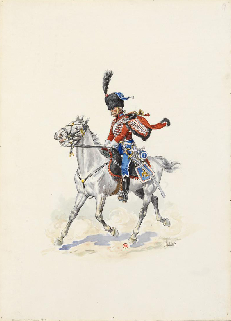 Trompette du 1er Hussards en 1809